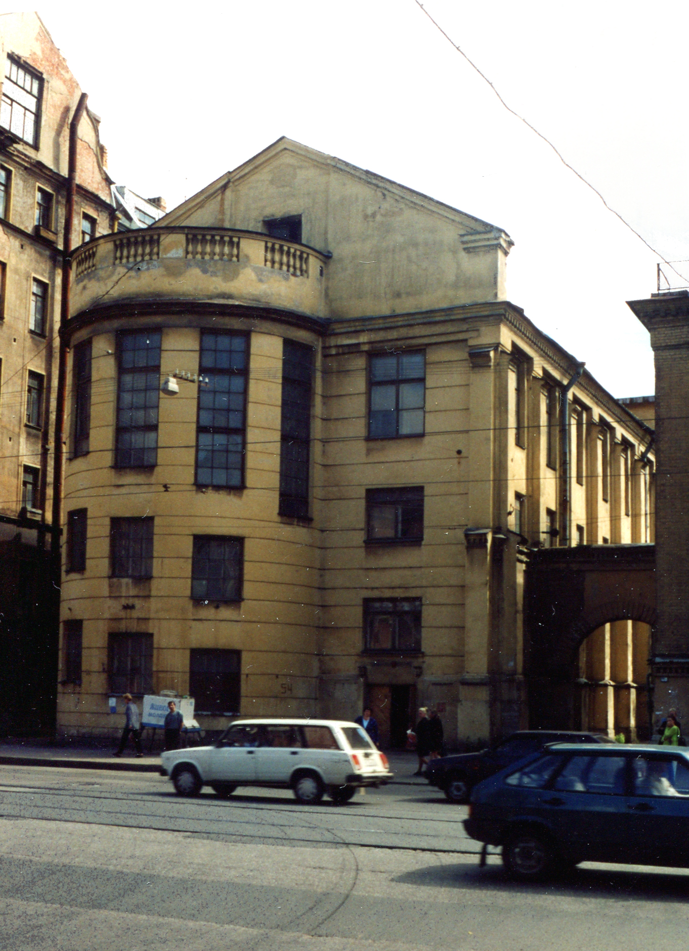 Здание эстонской церкви Святого Иоанна